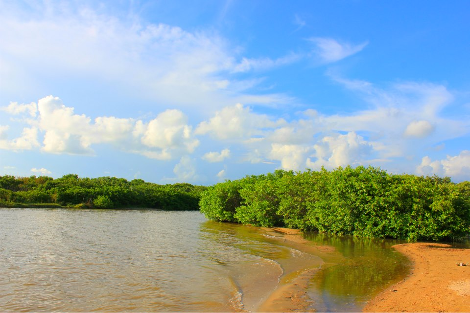 Playa Ventura en Arriaga Chiapas a 40 minutos de la cabecera municipal, fotografia de Jorge Luis de los Santos Trujillo